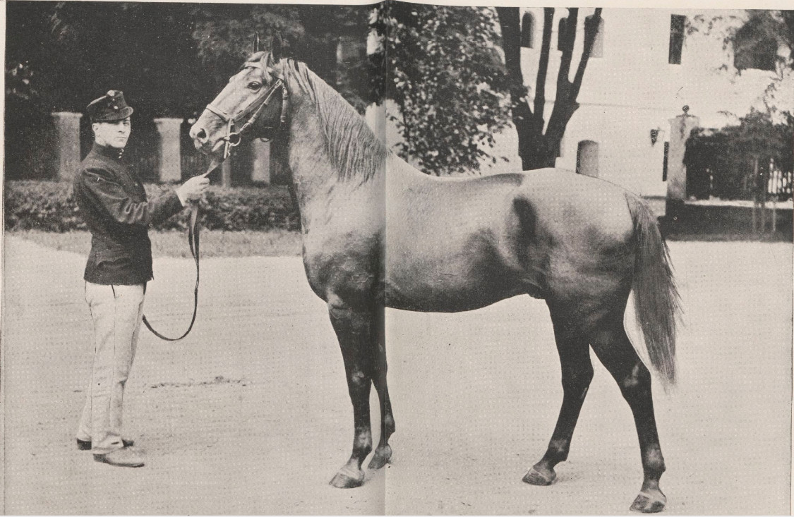 GIDRAN XL-10, ETALON ALEZAN NÉ A MEZÖHEGYES EN 1892